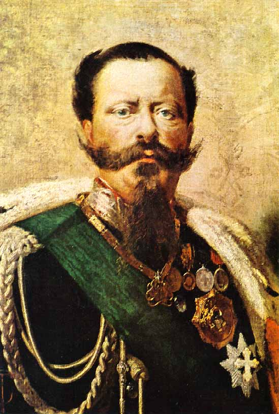 Vittorio Emanuele II di Savoia (1820-1878)